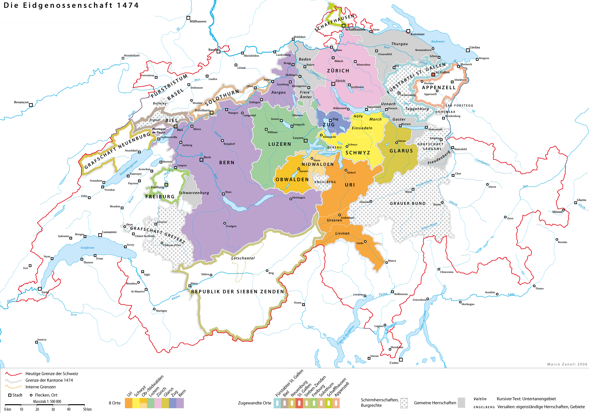 Die schweizerische Eidgenossenschaft um 1474 vor dem Burgunderkrieg